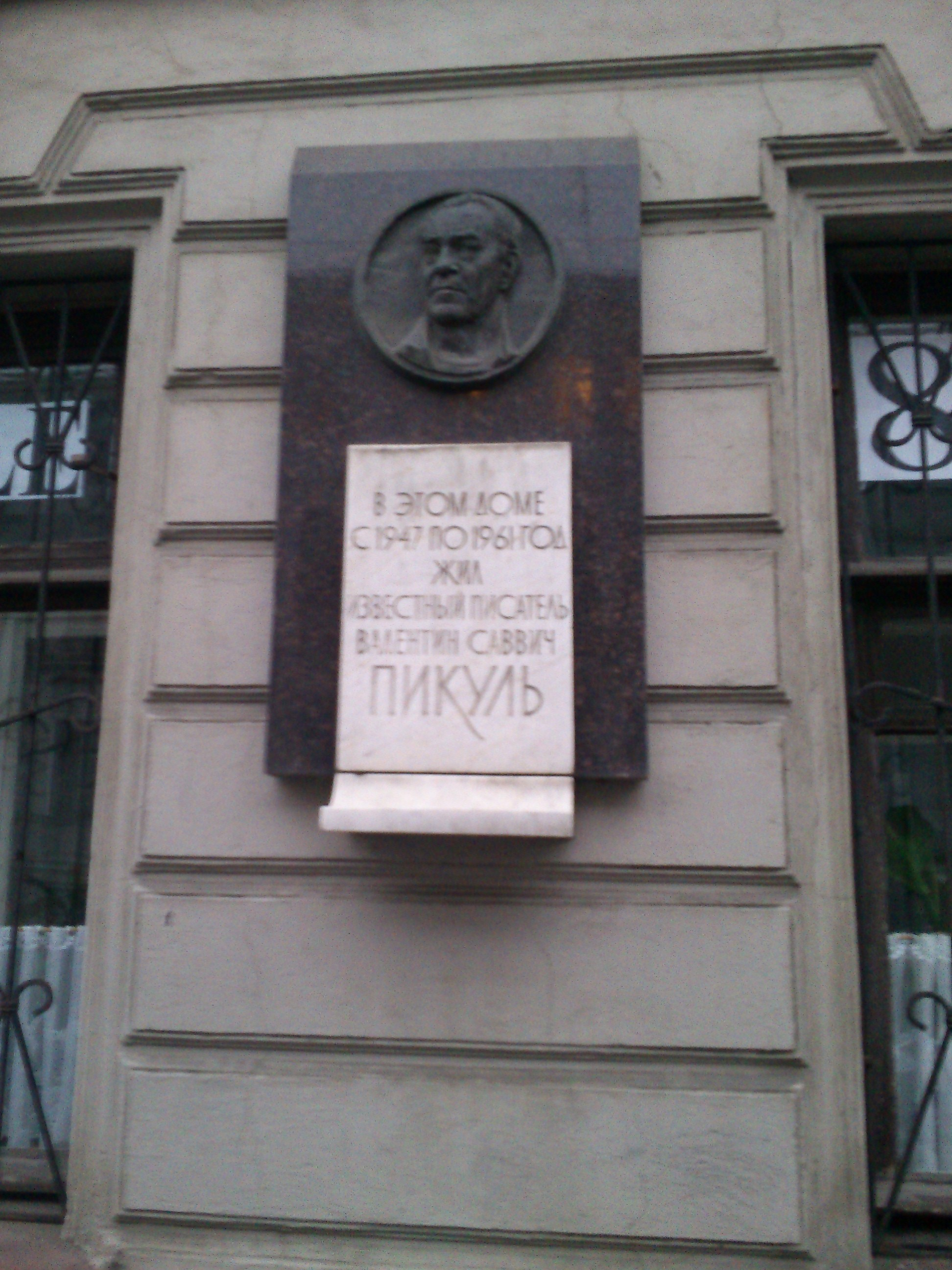 Памятная табличка на доме №16 по 4-й Красноармейской улице, в котором жил В. Пикуль